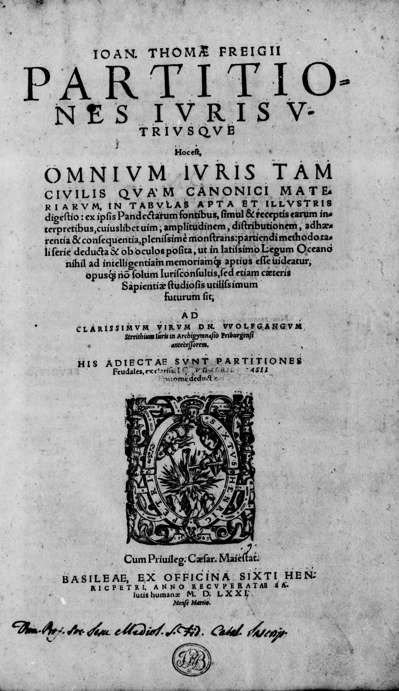 Frontespizio